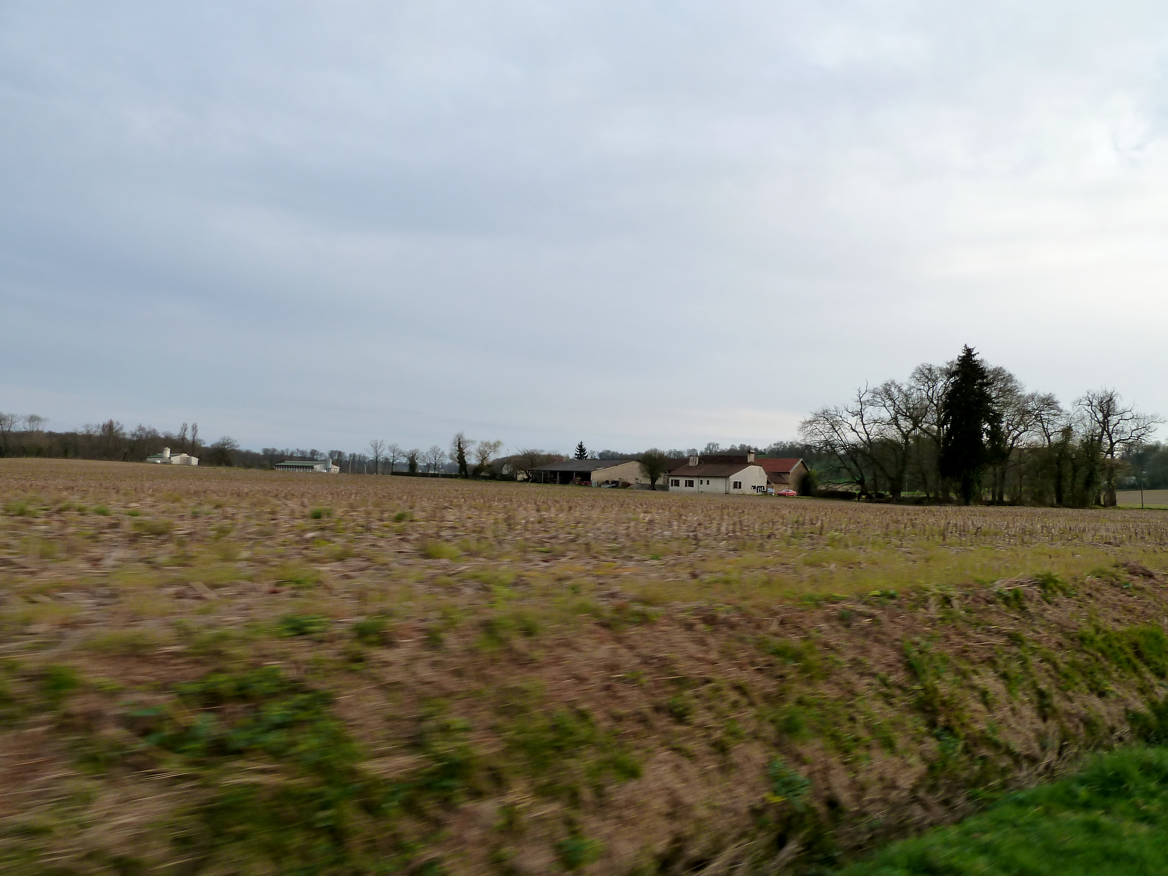 Mondebat